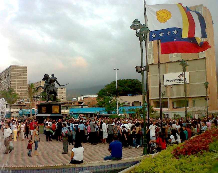 Plaza Mayor de Catia La Mar, estado Vargas